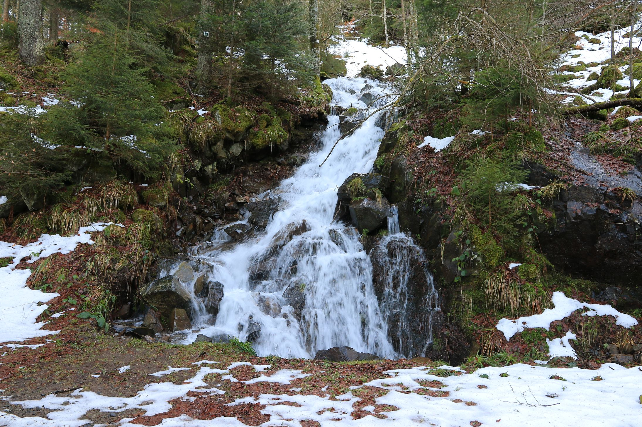 Cascade prise en Janvier.